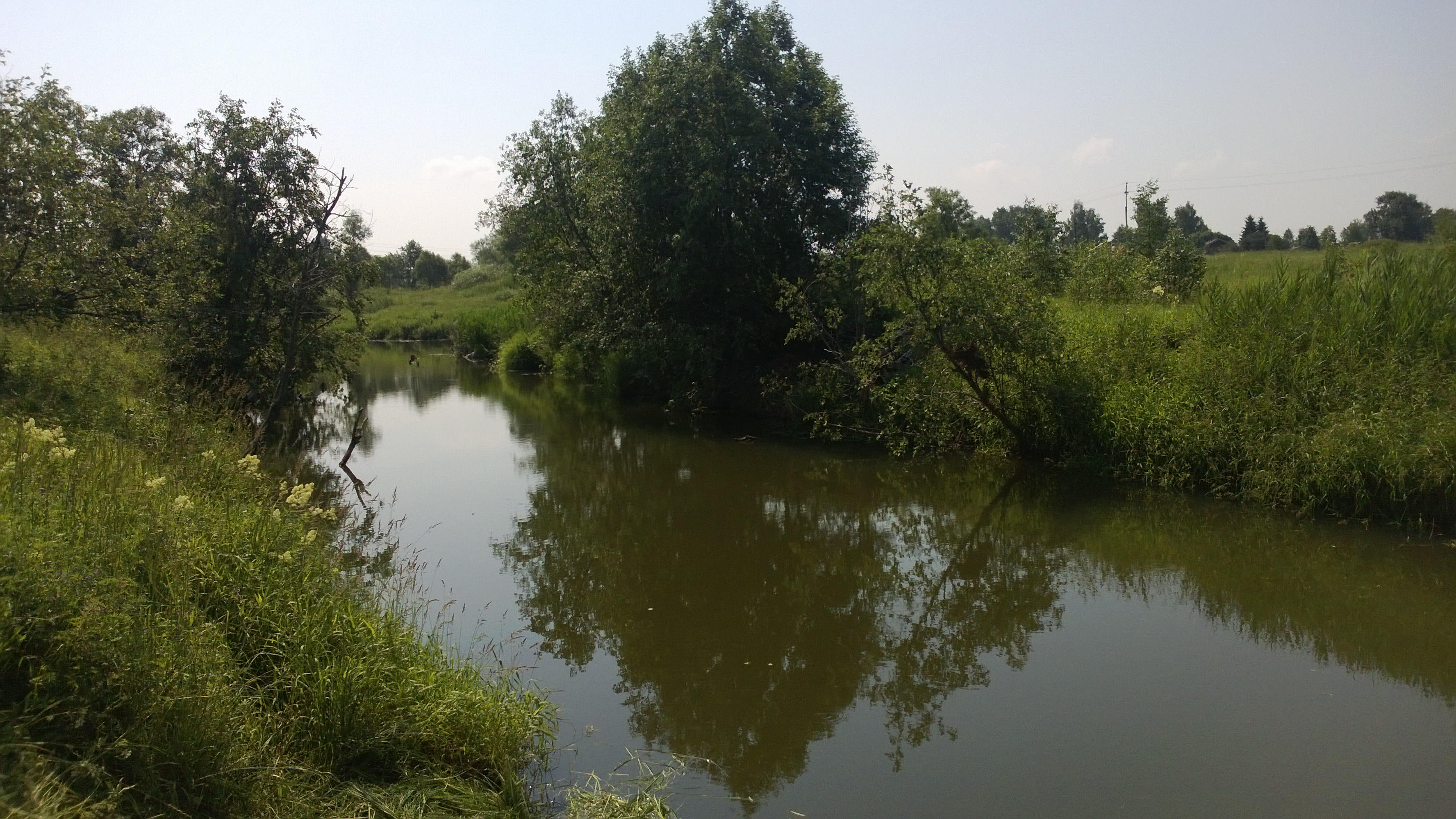 Устье реки Колпяны. Волоколамский район Московской области